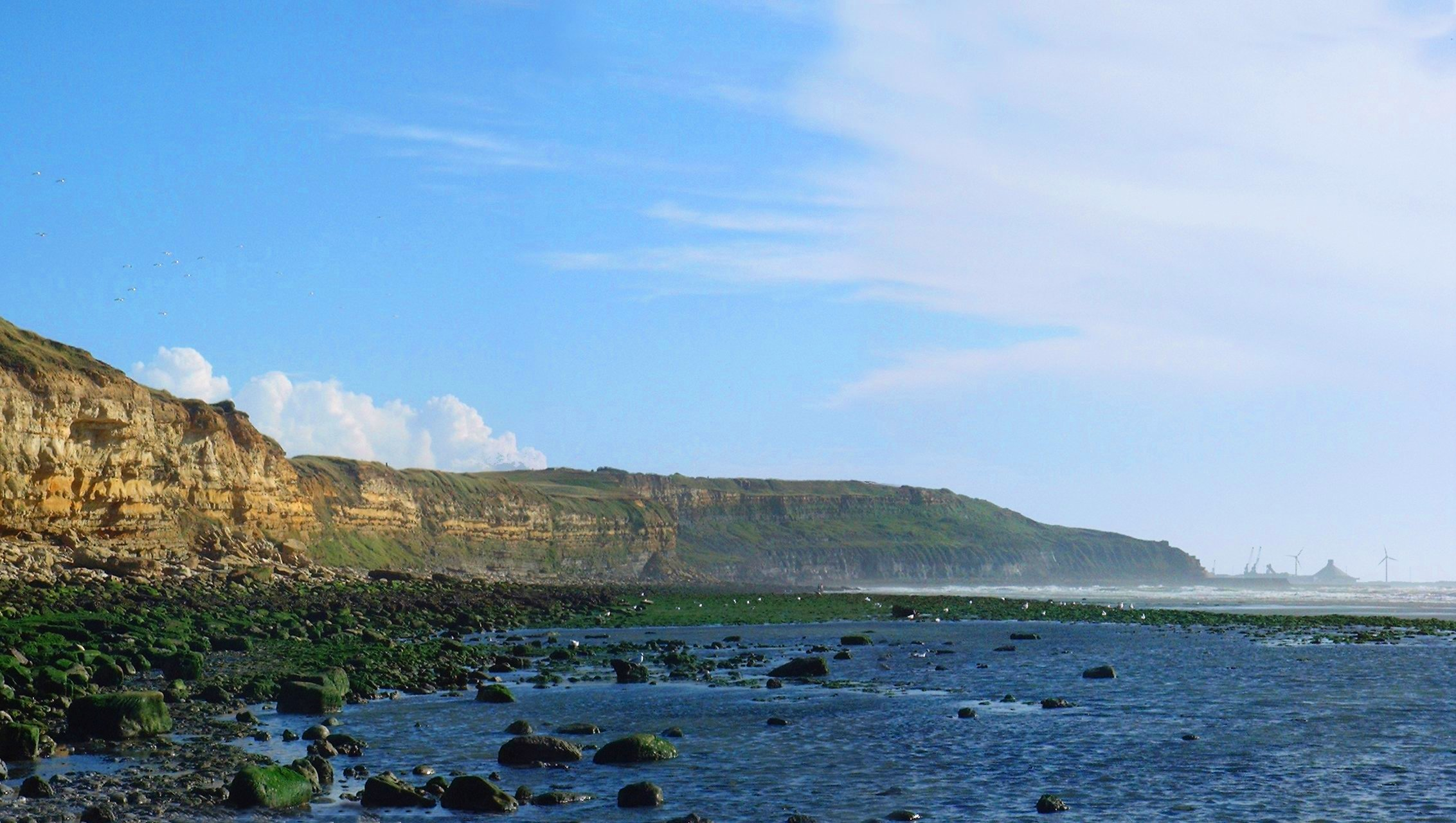 Pointe de la crèche, Wimereux (Pas-de-Calais)